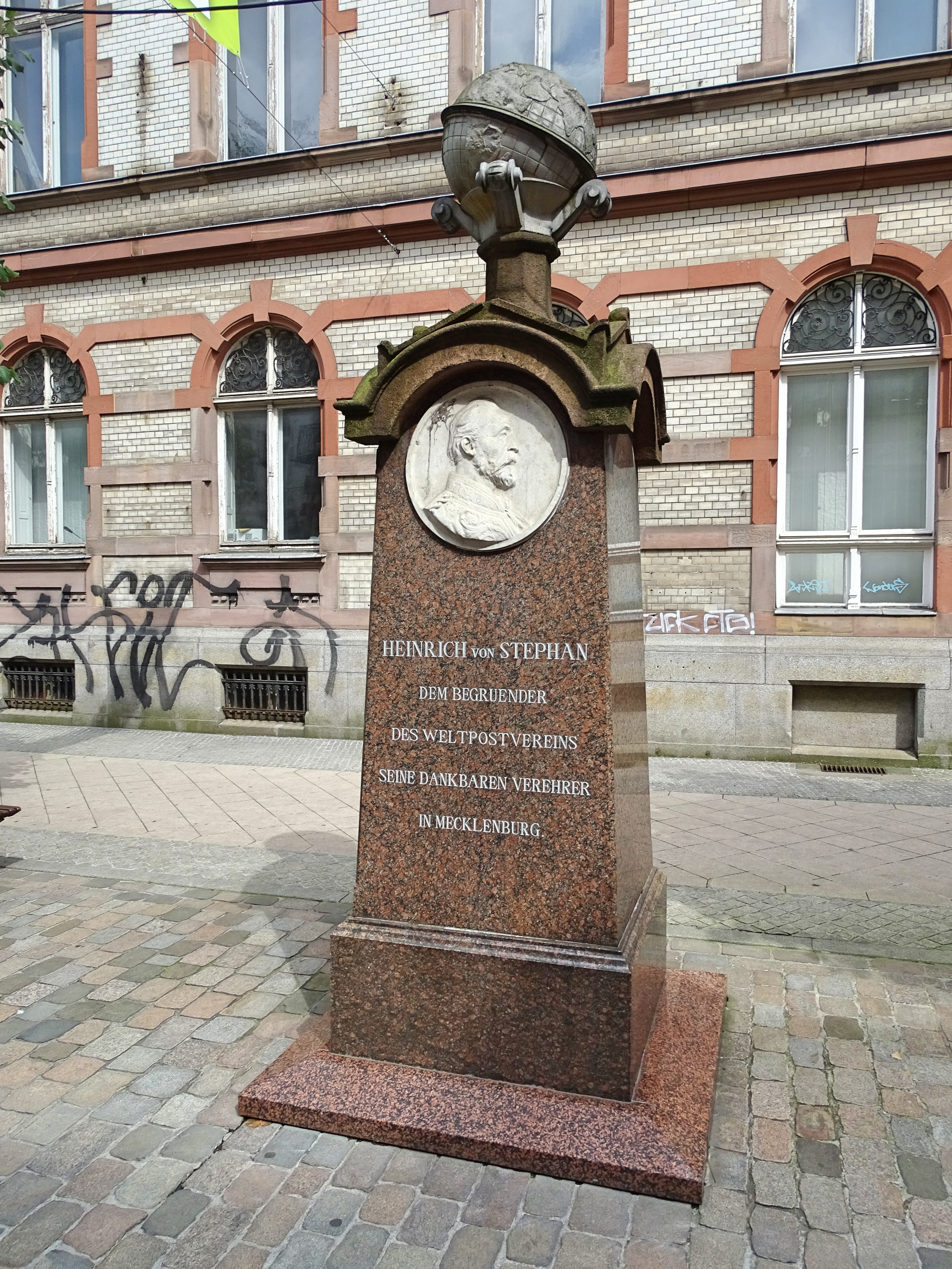 Schwerin, Germany